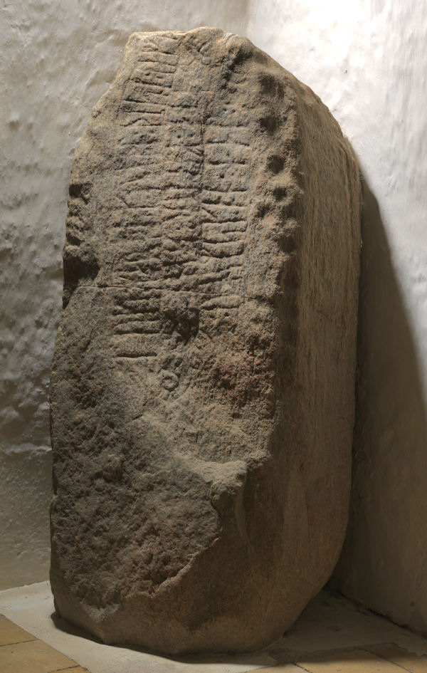 Foto: Nationalmuseet ved Roberto Fortuna